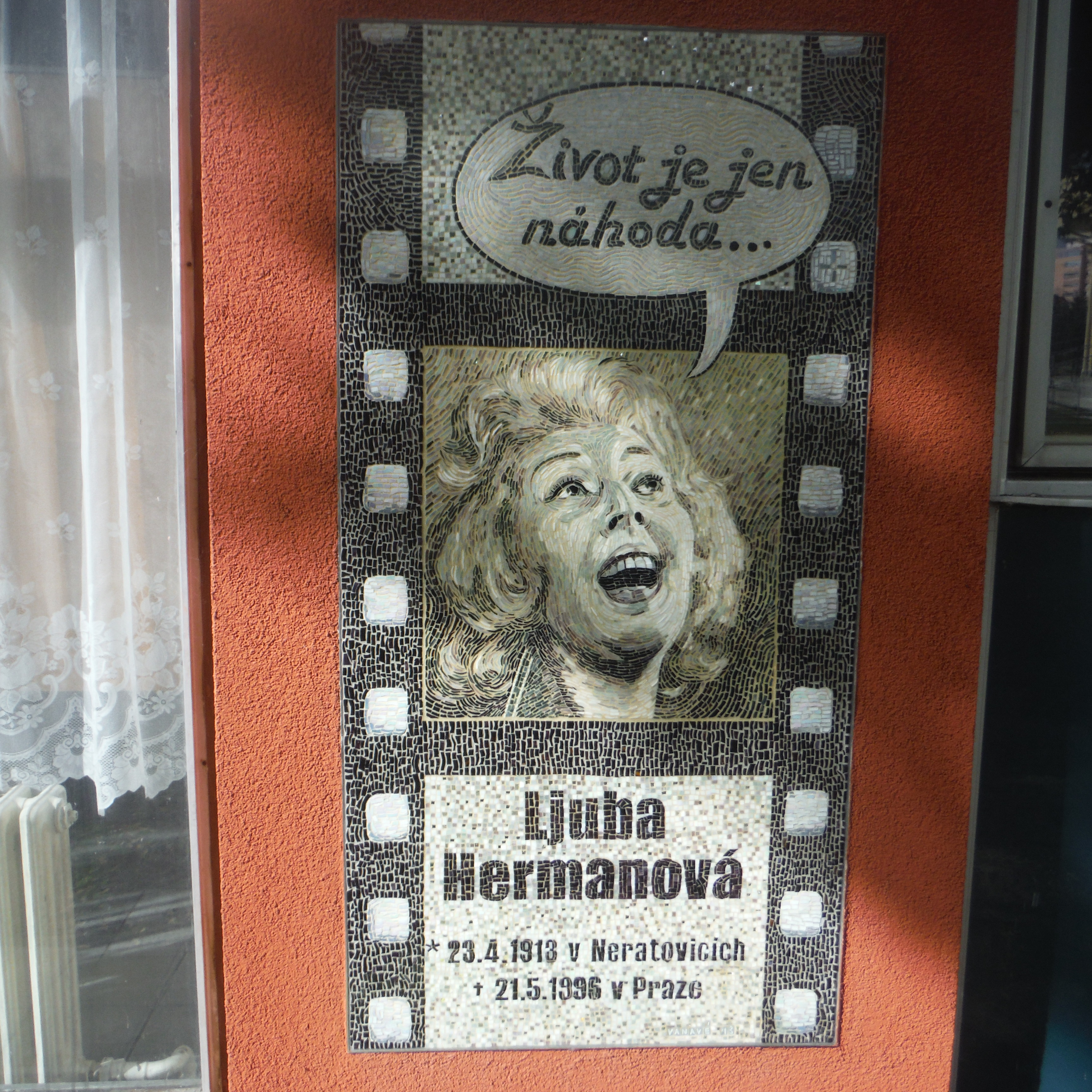 Pamětní deska. Autorka mozaiky Jana Voldřichová.[1]